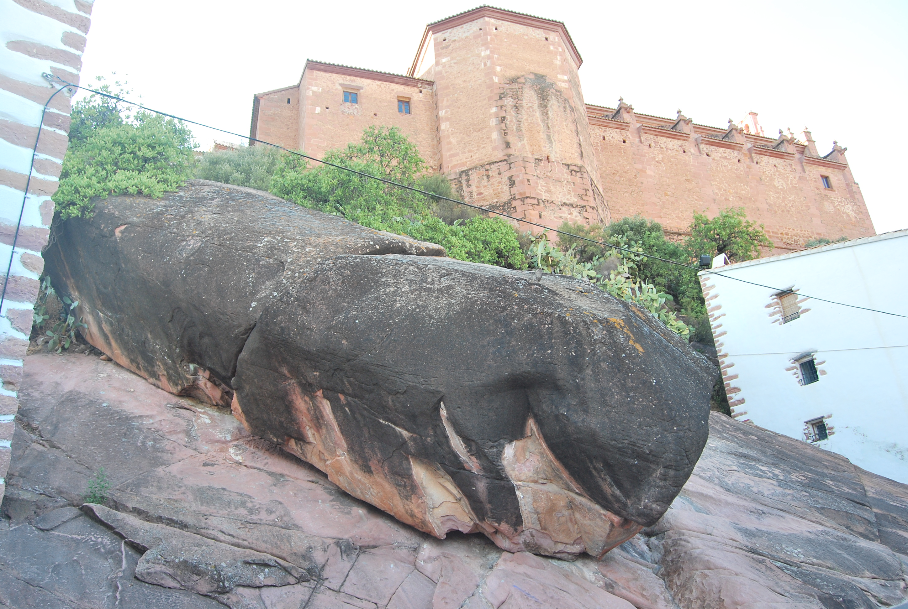 Roca Grossa 05.128-011.